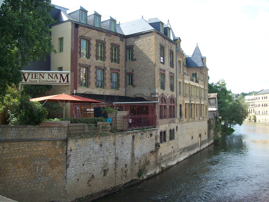 La Meuse à Sedan — Champagne-Ardenne, France